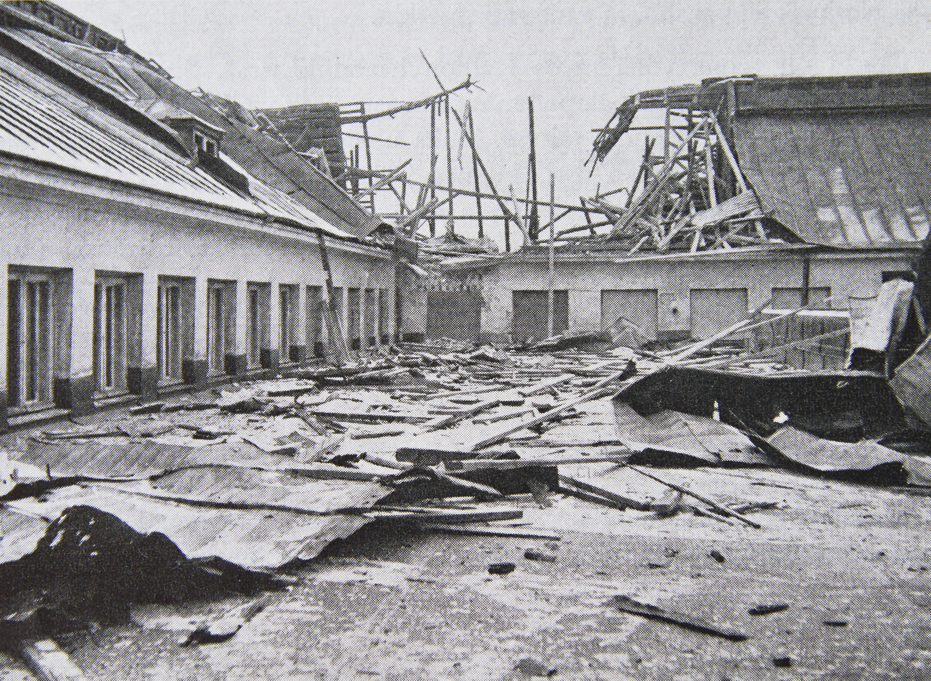 Stockmannin tavaratalon katto Helsingin suurpommituksen jäljiltä 26.2.1944.